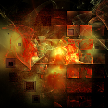 Szlávics Alexa képzőművész alkotása